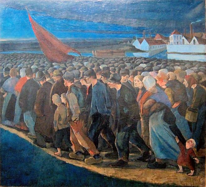 1893 General Strike